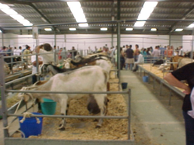 Feaga 2002